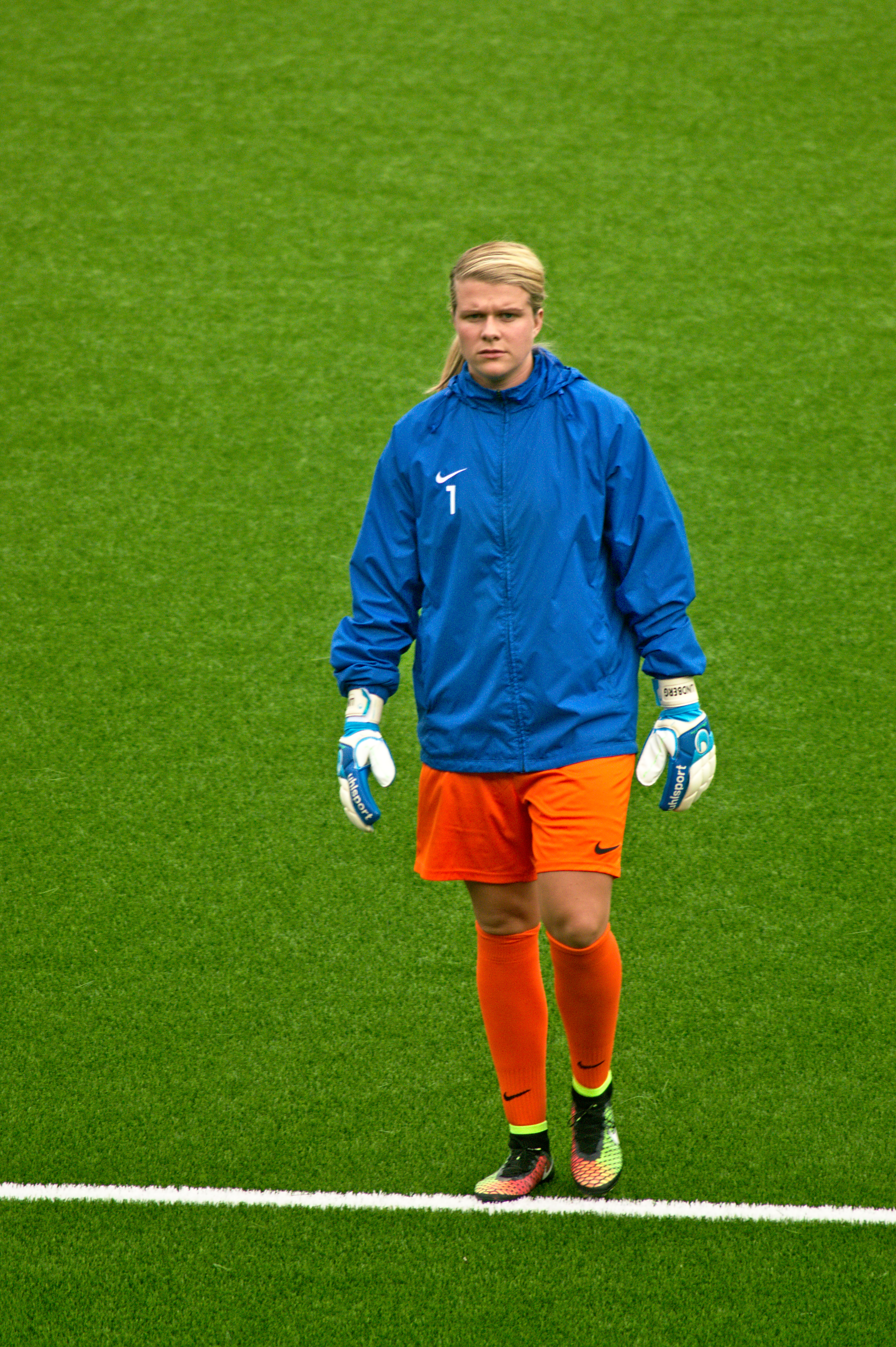 Eskilstuna United - FC Rosengård, Tunavallen i Eskilstuna 5 augusti 2015. Uppvärmning.